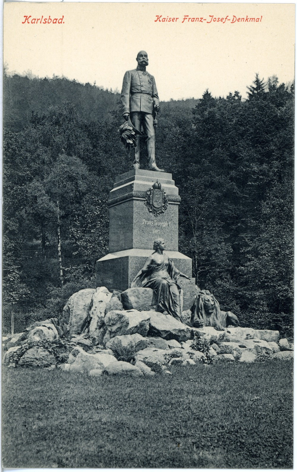 Karlsbad; Kaiser-Franz-Josef-Denkmal This postcard is from publisher Brück & Sohn in Meißen ( postcard has a unique number 18099 and is available in a higher resolution at the publisher. This images was uploaded in a cooperation project between Wikipedians and the publisher.